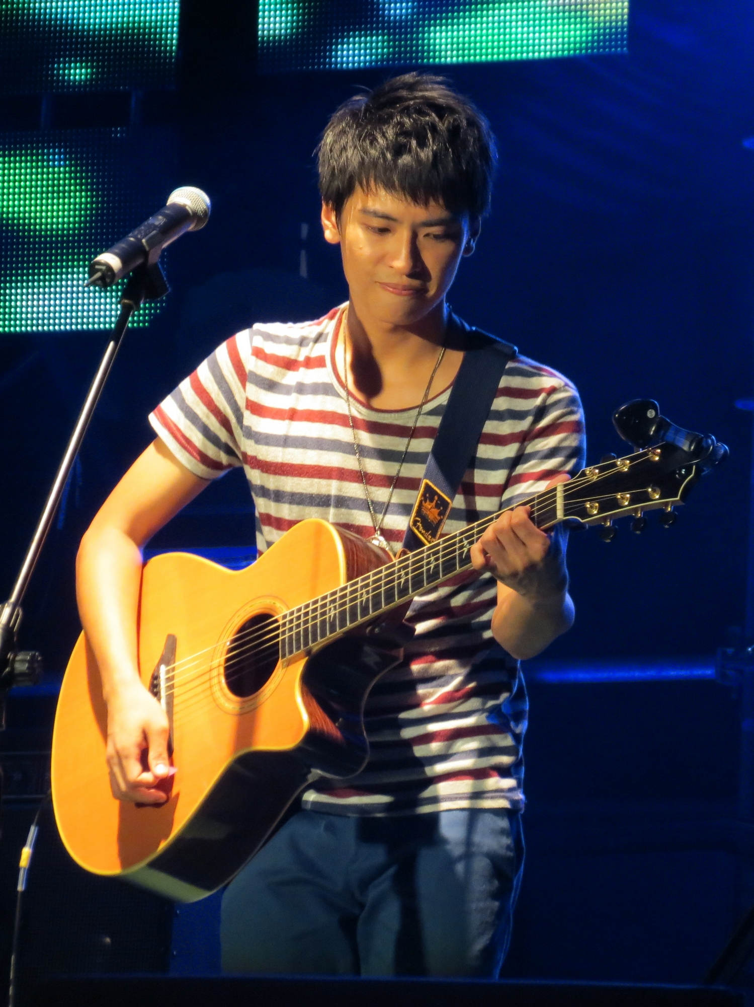 20130804-地球FUN輕鬆音樂節-高雄漢神巨蛋 廖文強